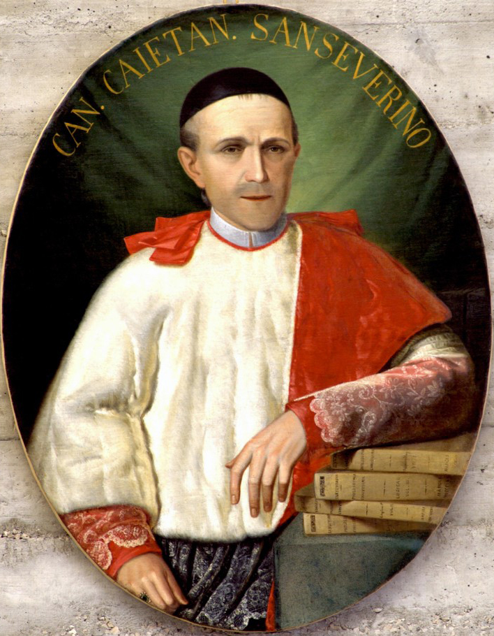 Ritratto di Gaetano Sanseverino, teologo, sacerdote